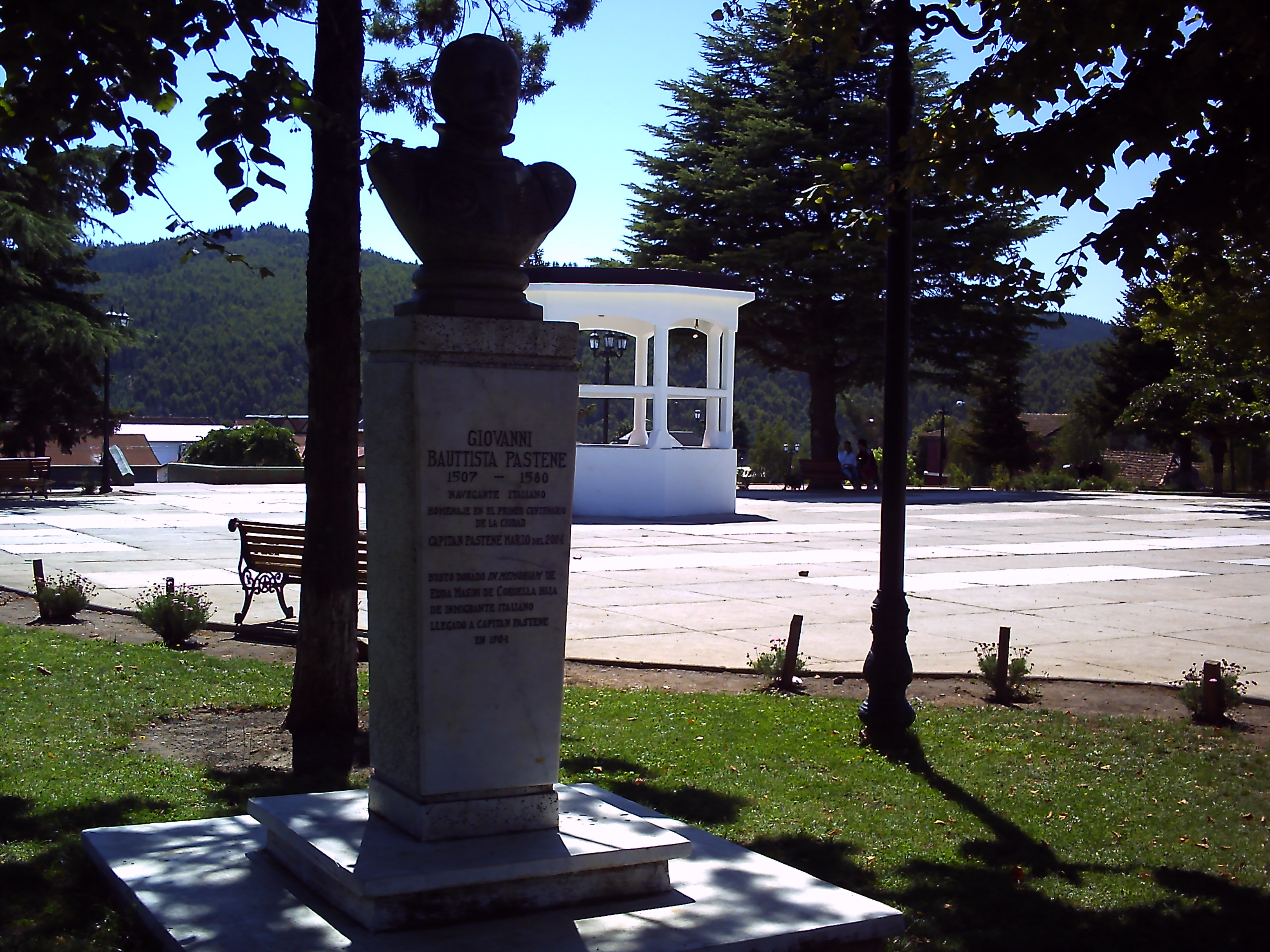 Busto del Capitán Pastene, Capitán Pastene, Chile